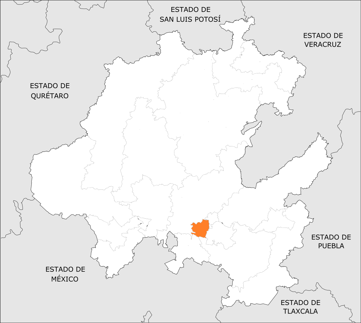 Distrito Electoral Local de Hidalgo 13